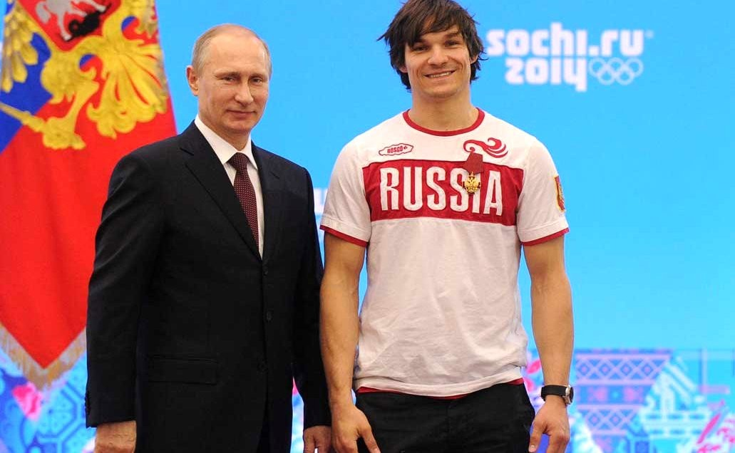 Орденом «За заслуги перед Отечеством» четвёртой степени награждён двукратный олимпийский чемпион в сноуборде Виктор Вайлд.